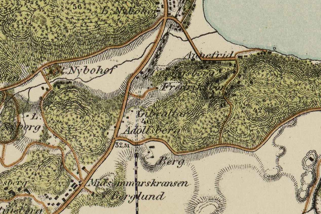 Blad nr V (mellersta bladet) ur Topografiska Corpsens serie Trakten omkring Stockholm i nio blad. Utgiven 1861 och översedd 1891